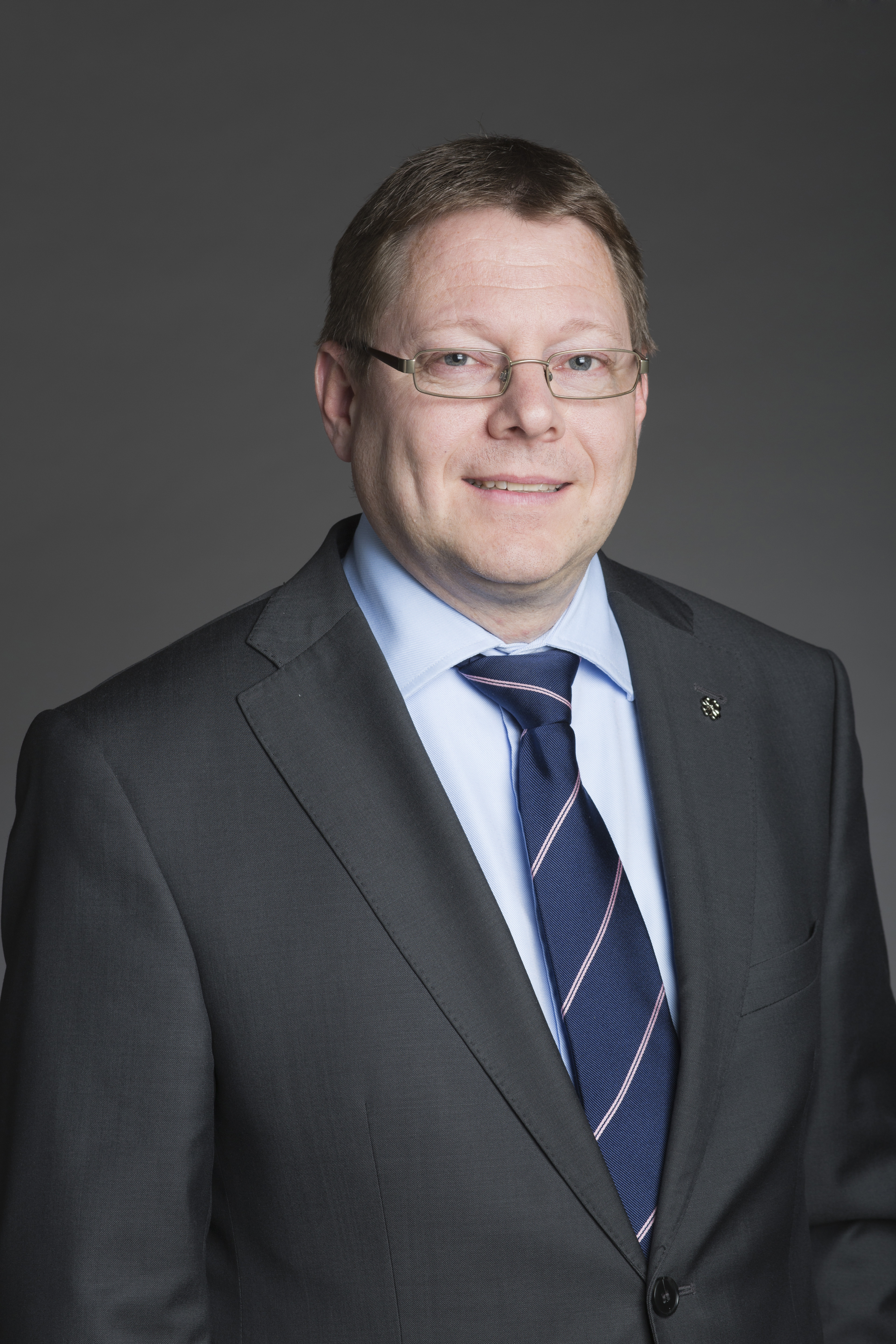 Per Lodenius, Riksdagsledamot för Centerpartiet.